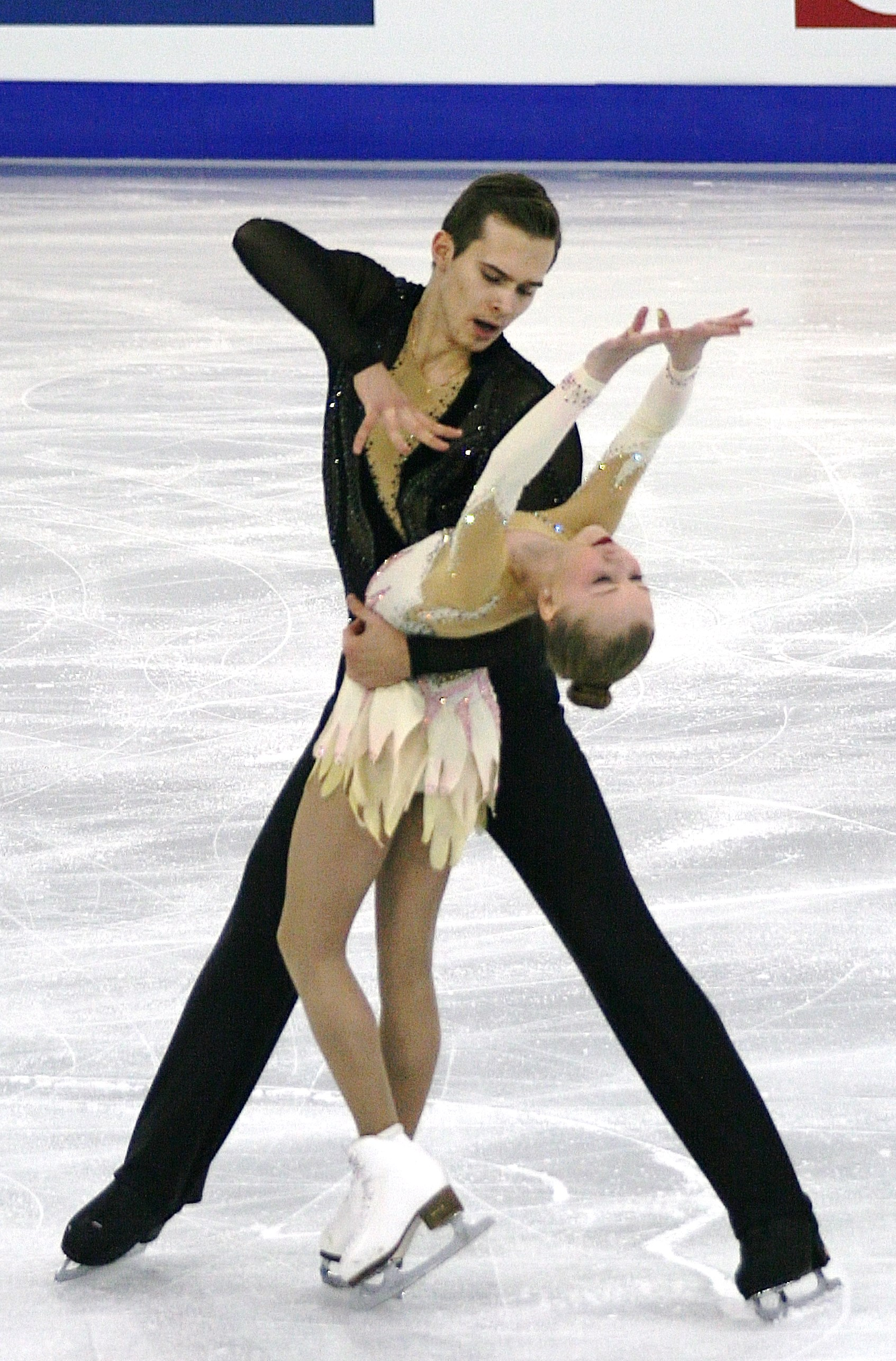 Мария Выгалова и Егор Закроев (Россия) на финале Гран-при среди юниоров 2014-2015.